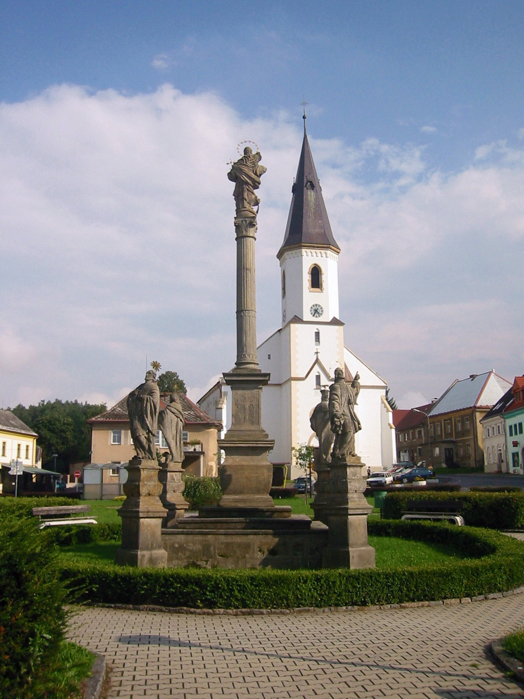 Mariánský sloup a kostel sv. Víta na náměstí v Osečné, okres Liberec